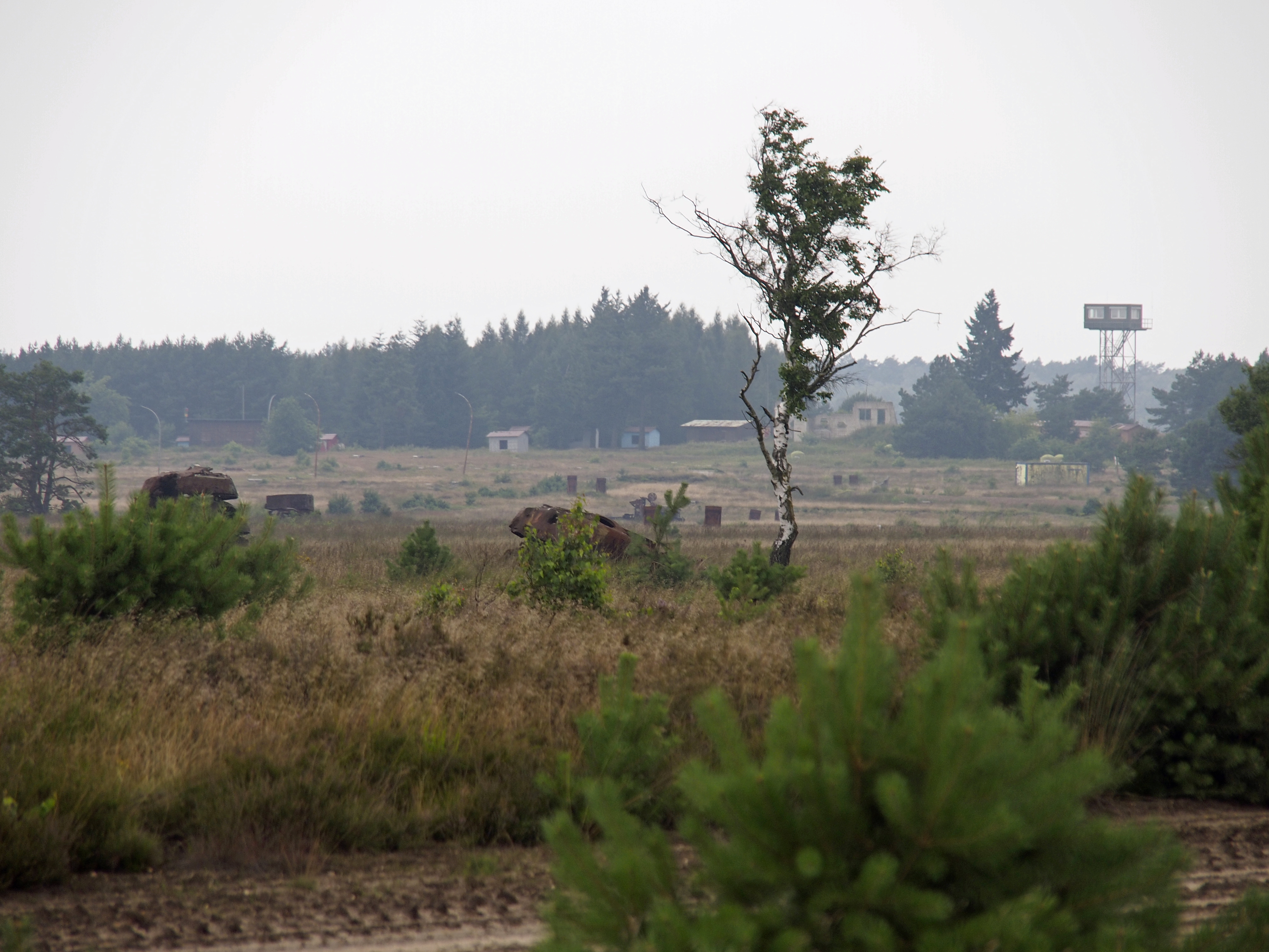 Schießbahn 18 (Emmans-Höhe), Truppenübungsplatz Munster-Süd